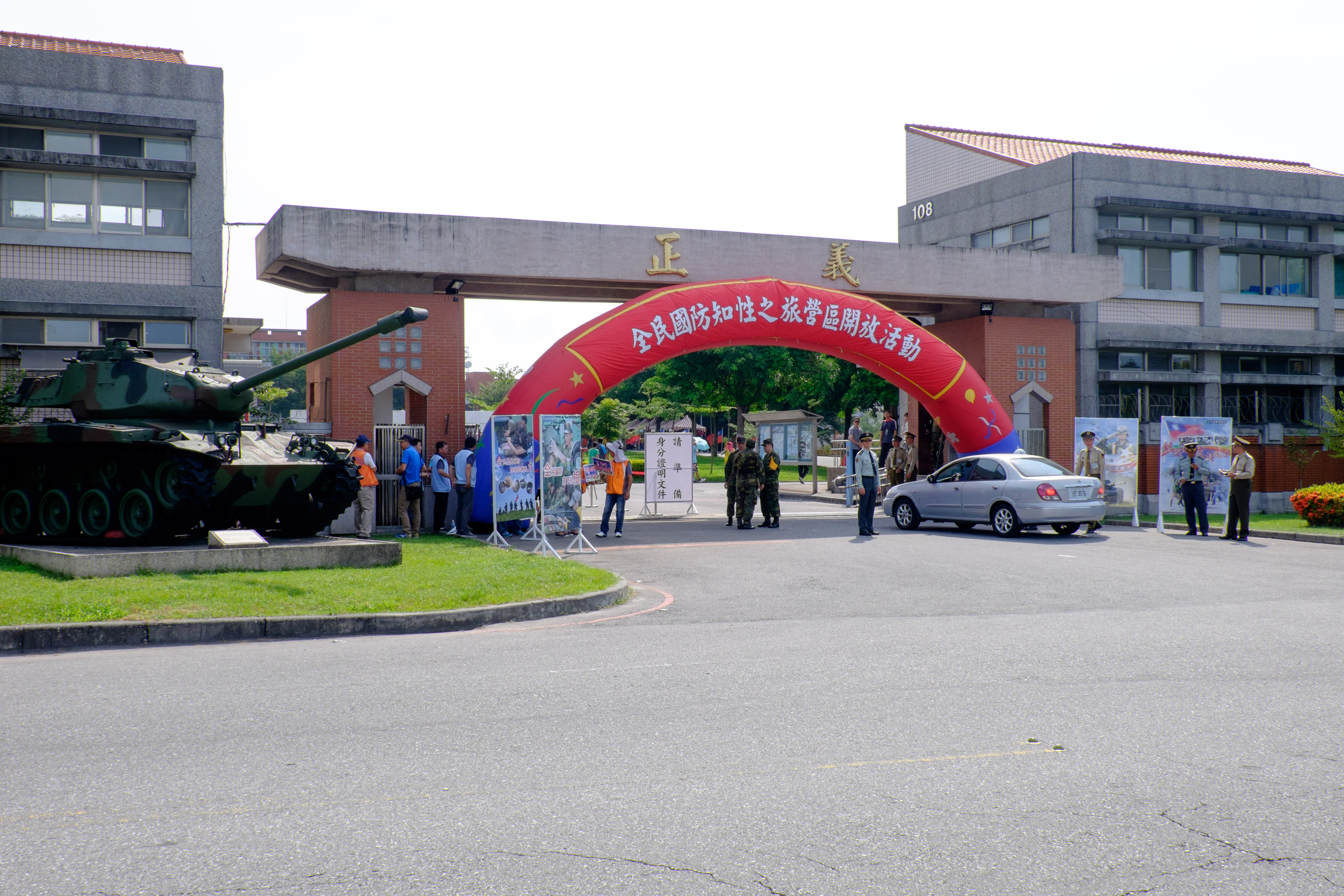 陸軍花東防衛指揮部南美崙營區正門，2015年營區開放活動日攝影。